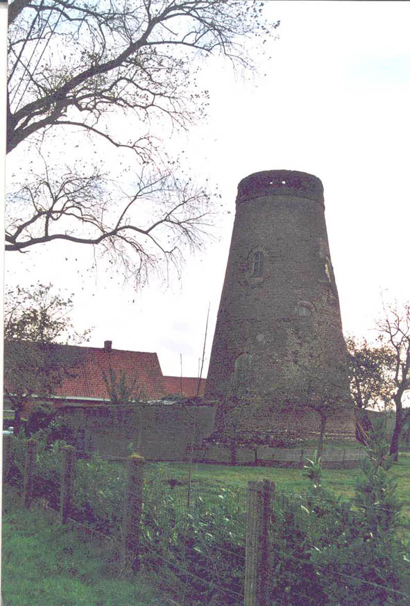 antwerpse heirweg 25 foto 1